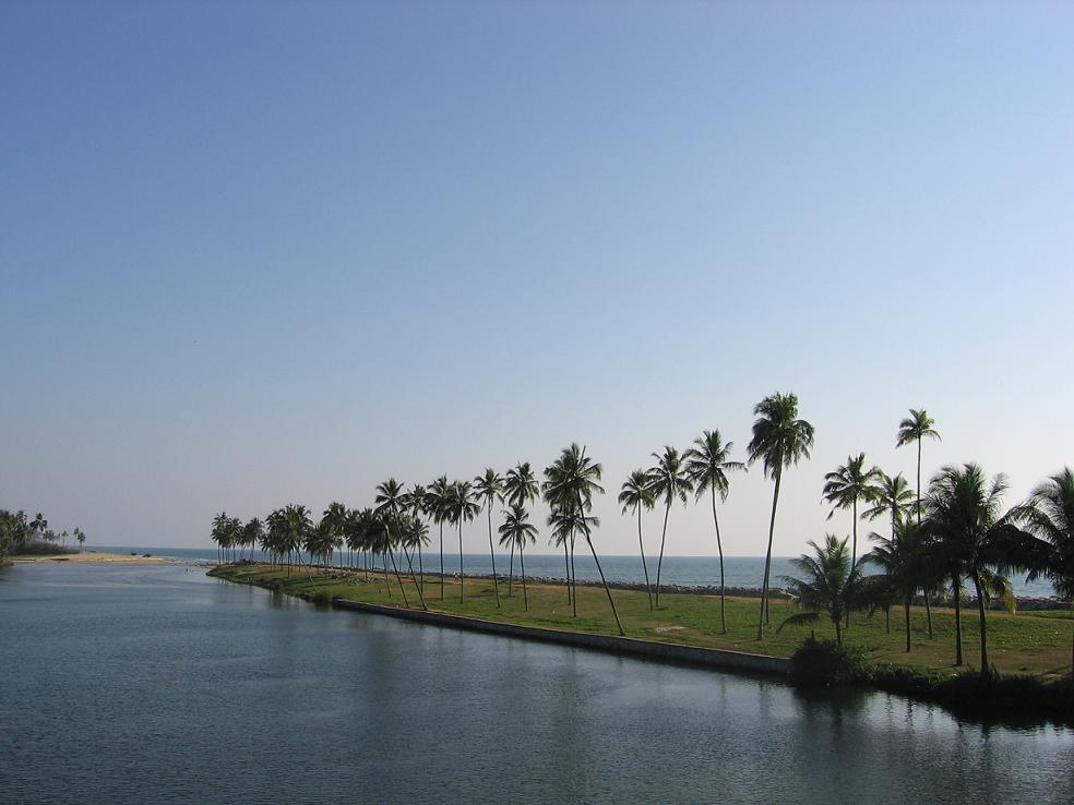 കാപ്പിൽ തീരം